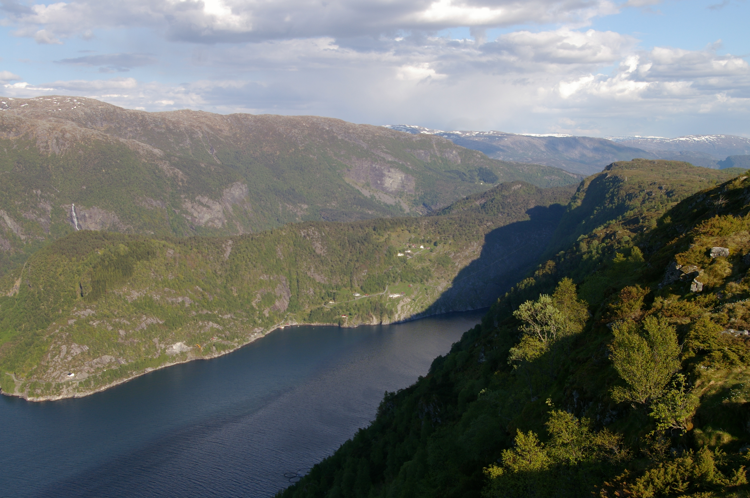 Austfjorden seen from Djupdalseggane, Lindås, Hordaland, Norway.